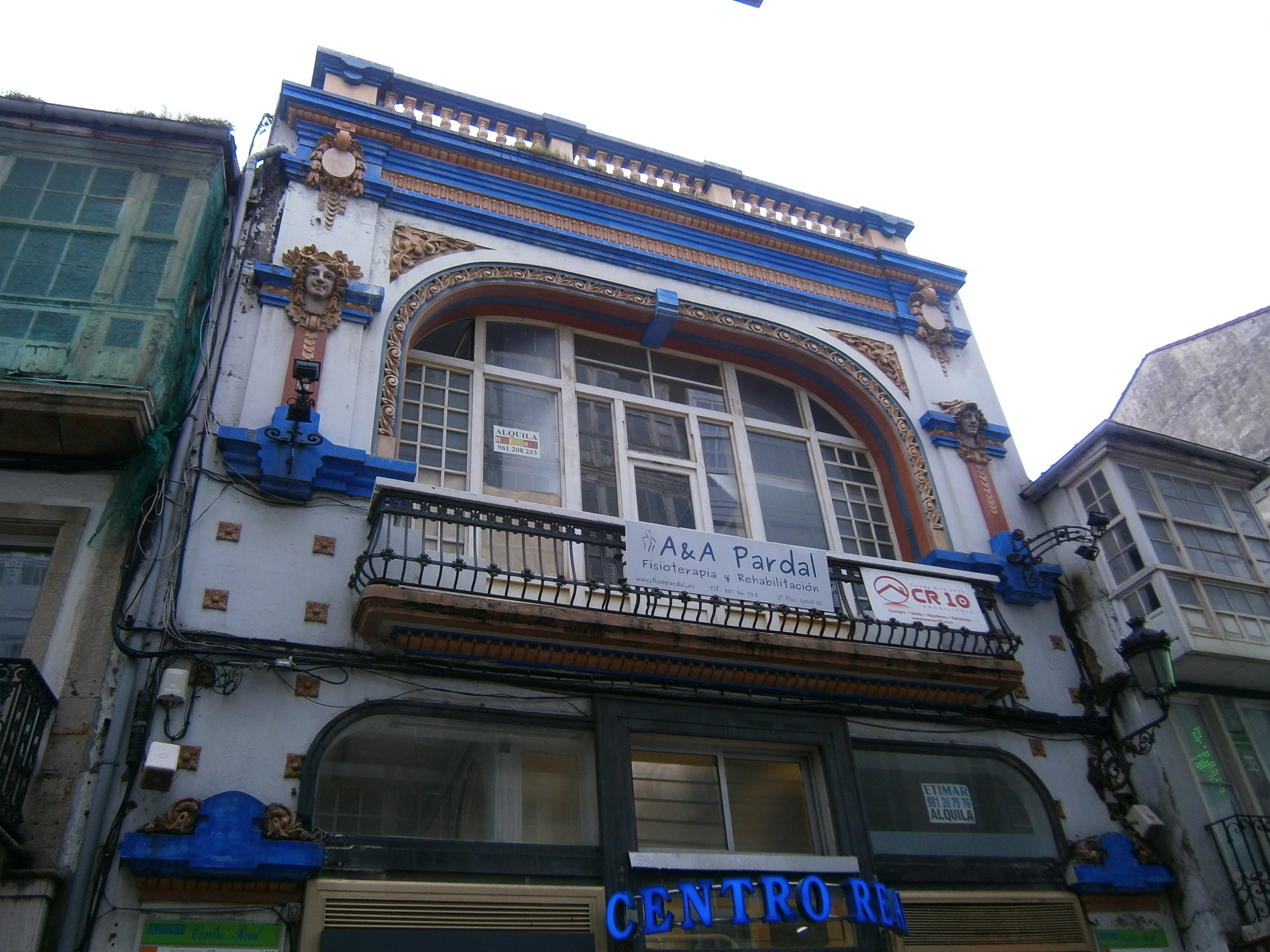 Antigo Café Moderno, na rúa Real da Coruña